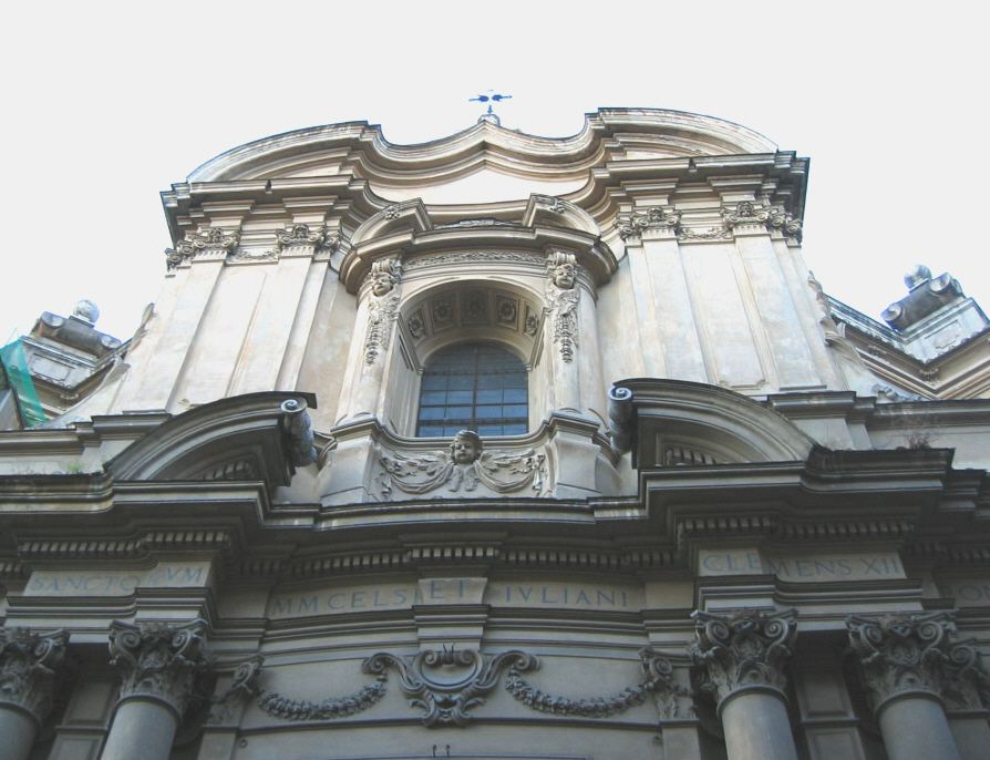 Carlo de Dominicis - Santi Celso e Giuliano (1733), Roma. Dettaglio della facciata. Picture by Torvindus.